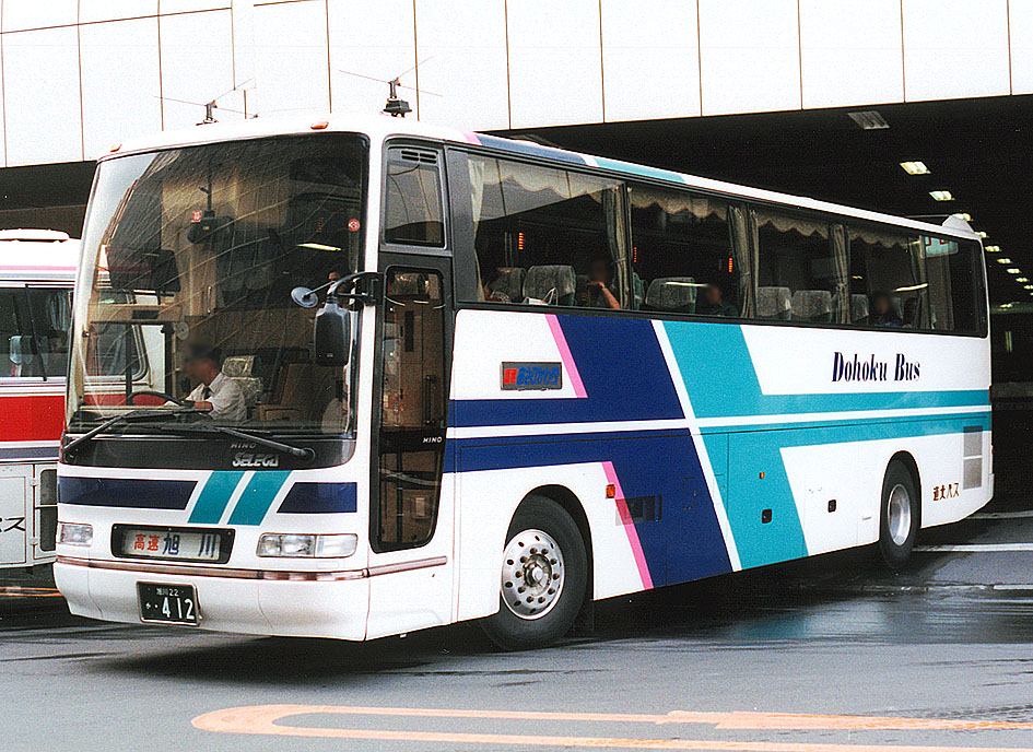 道北バス 高速あさひかわ号 日野・セレガGD